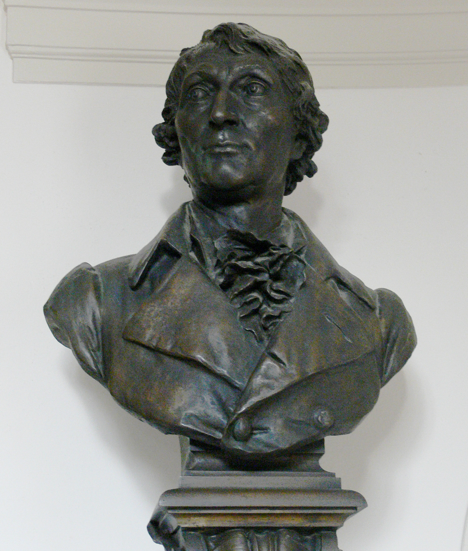 Büste Franz Carl Achard, von Ferdinand Lepcke, 1892, Zucker-Museum Berlin (Leihgabe des Märkischen Museums Berlin)